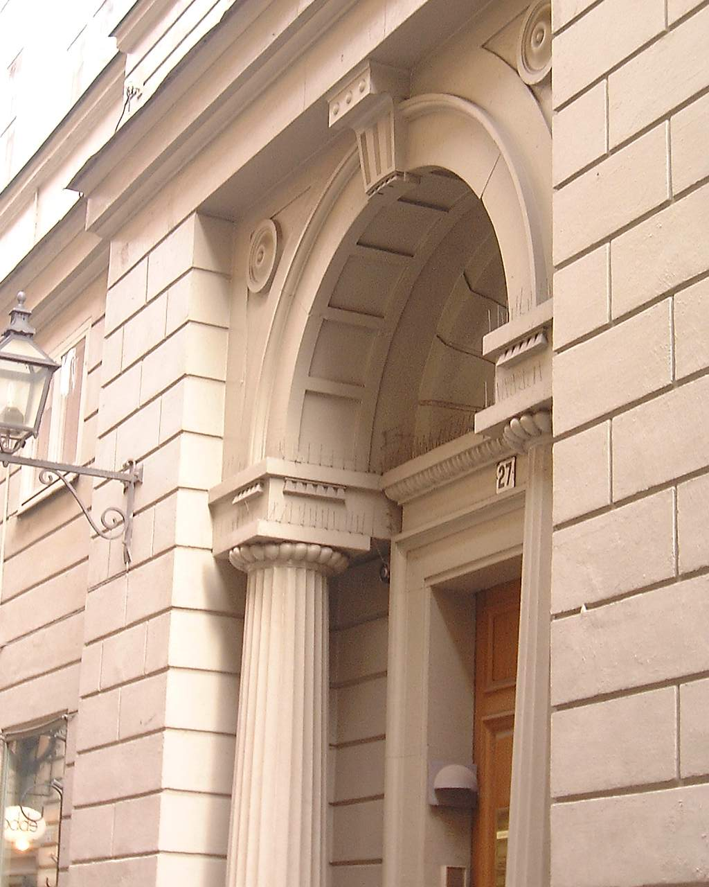 Detail of 27, Västerlånggatan. Gamla stan, Stockholm.